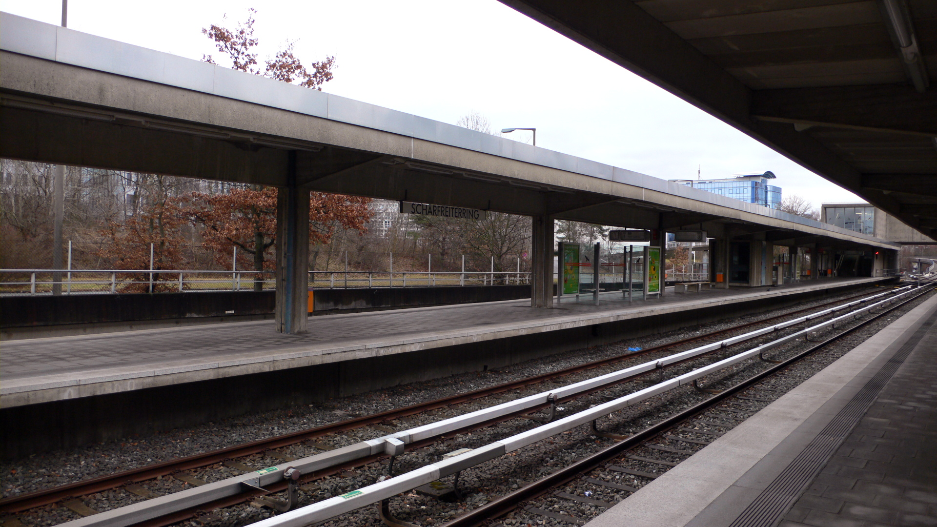 U-Bahnhof Scharfreiterring der U-Bahn Nürnberg, Bahnsteigebene, Blick von Westen